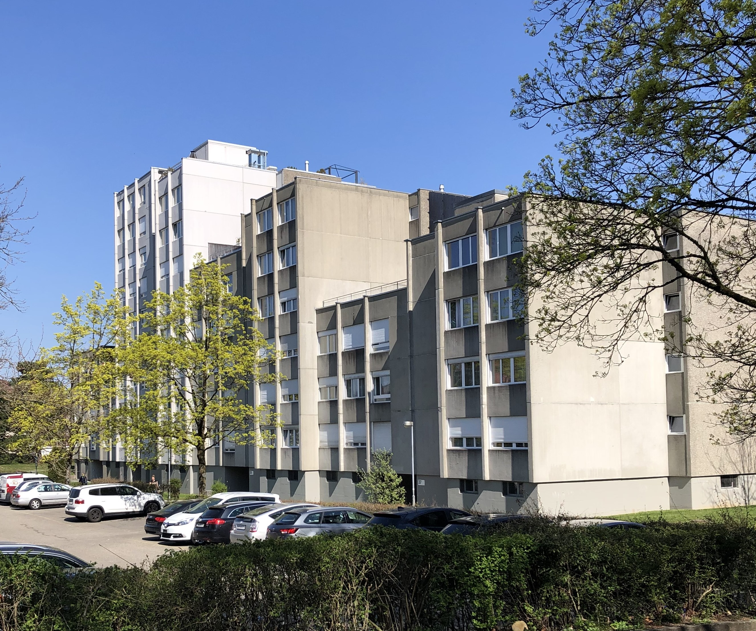 Kleefeld Bebauung Neubauten